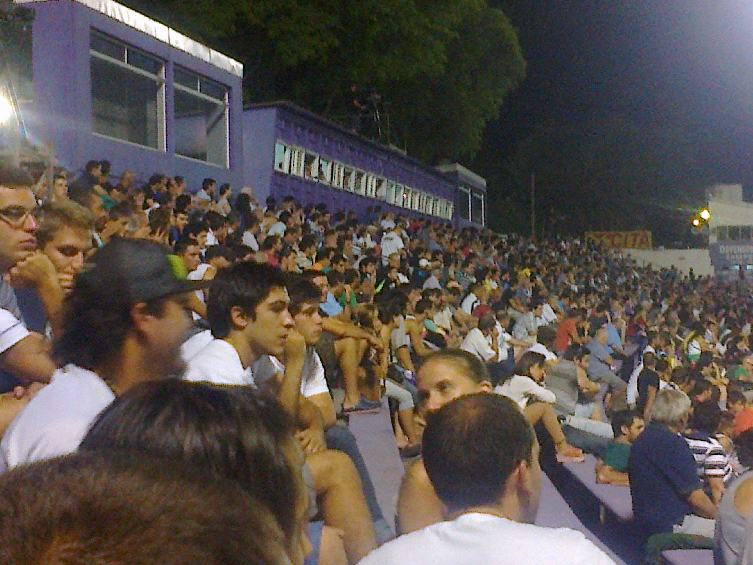 Imagen de la hinchada de Defensor Sporting en el Estadio Luis Franzini de Montevideo, Uruguay.